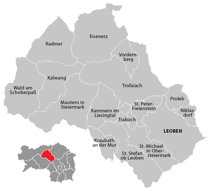 Gemeinden im Bezirk Leoben (Steiermark), Stand: 1. Januar 2015